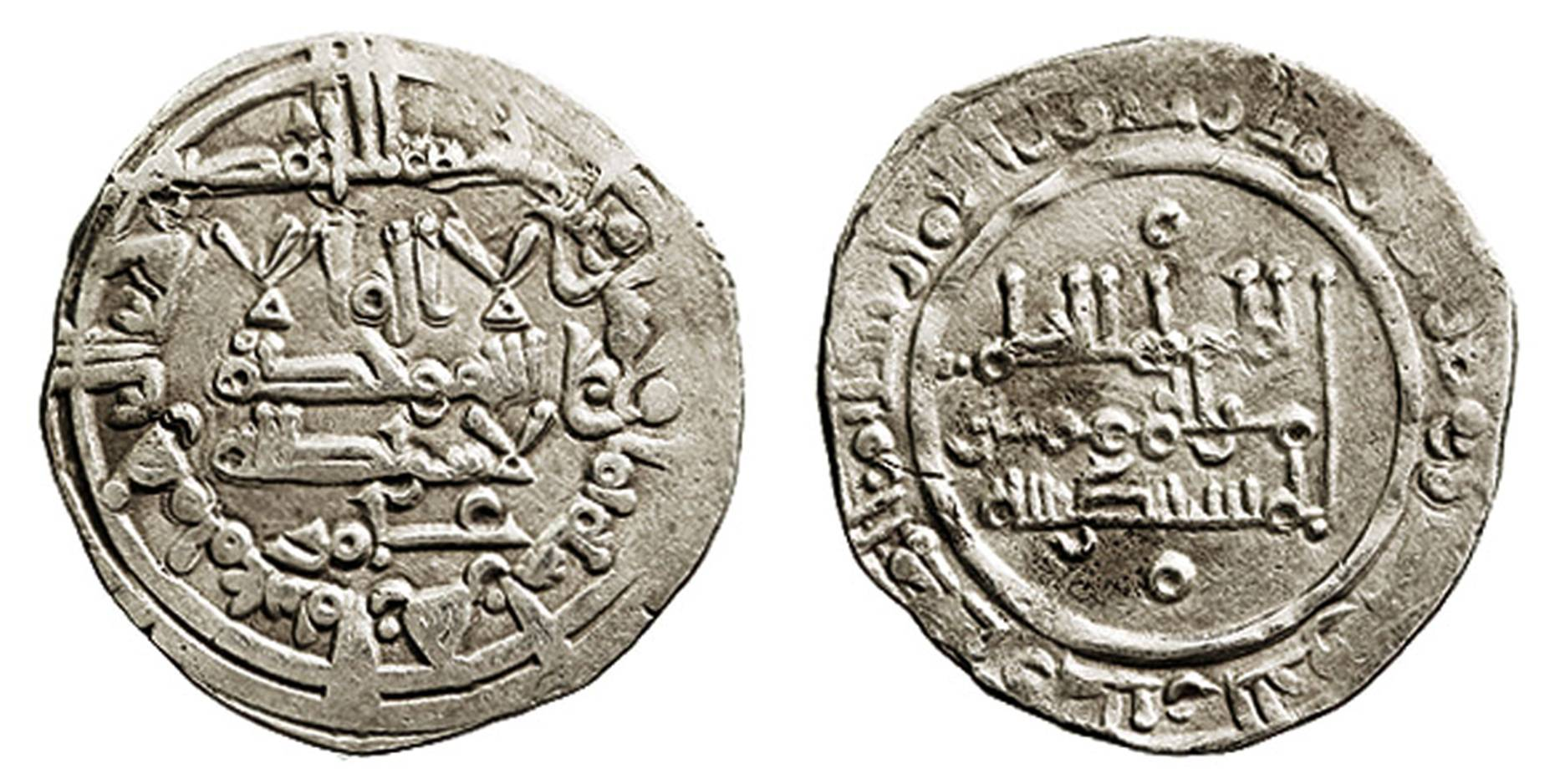 Moneda del Califa de Córdoba Al-Hakem II. Dírhem de plata. Medina Azahara. Año 358 de la Hégira (968 o 969 del calendario juliano). Fuente citada: Vives, A. Las monedas de las dinastías Arábigo Españolas. Madrid, 1998 (reedición), p. 459.